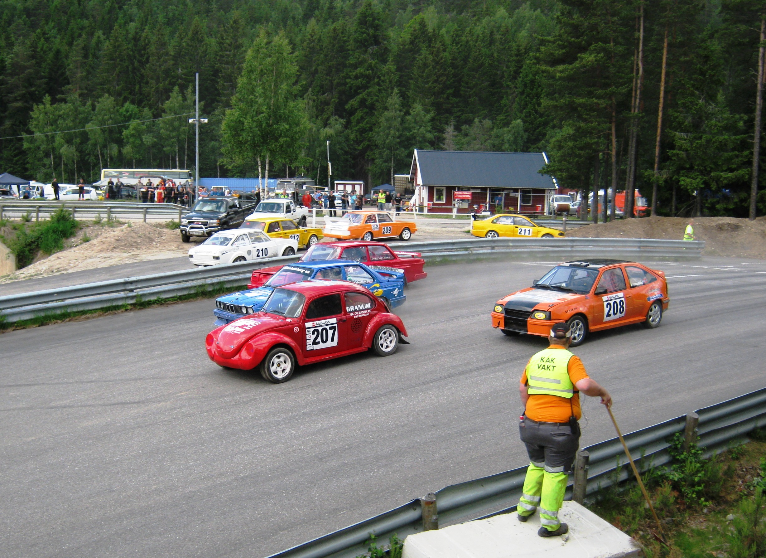 Ruglandsbanen rallycrossbane